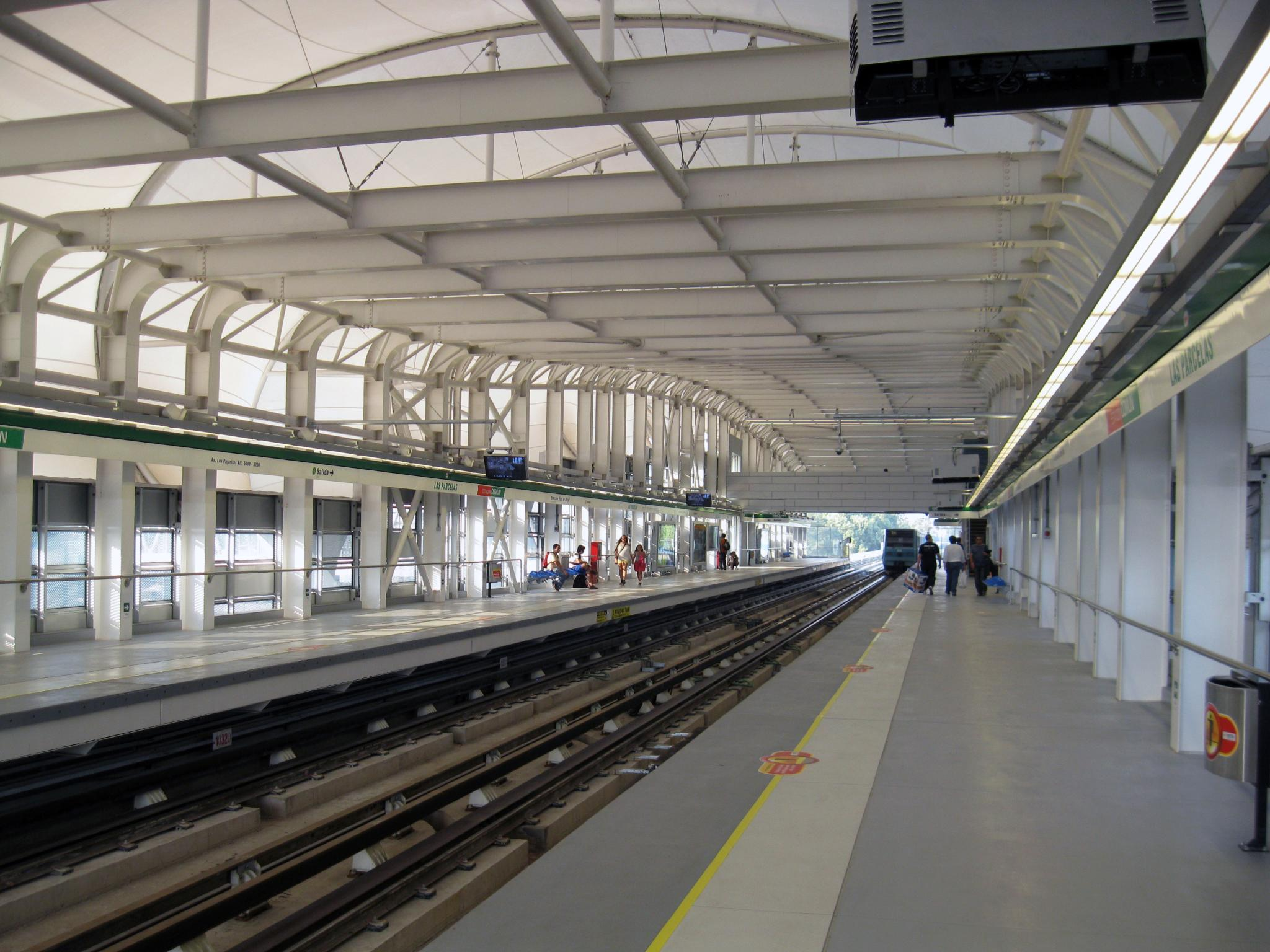 Extensión Poniente Línea 5: Febrero 2011